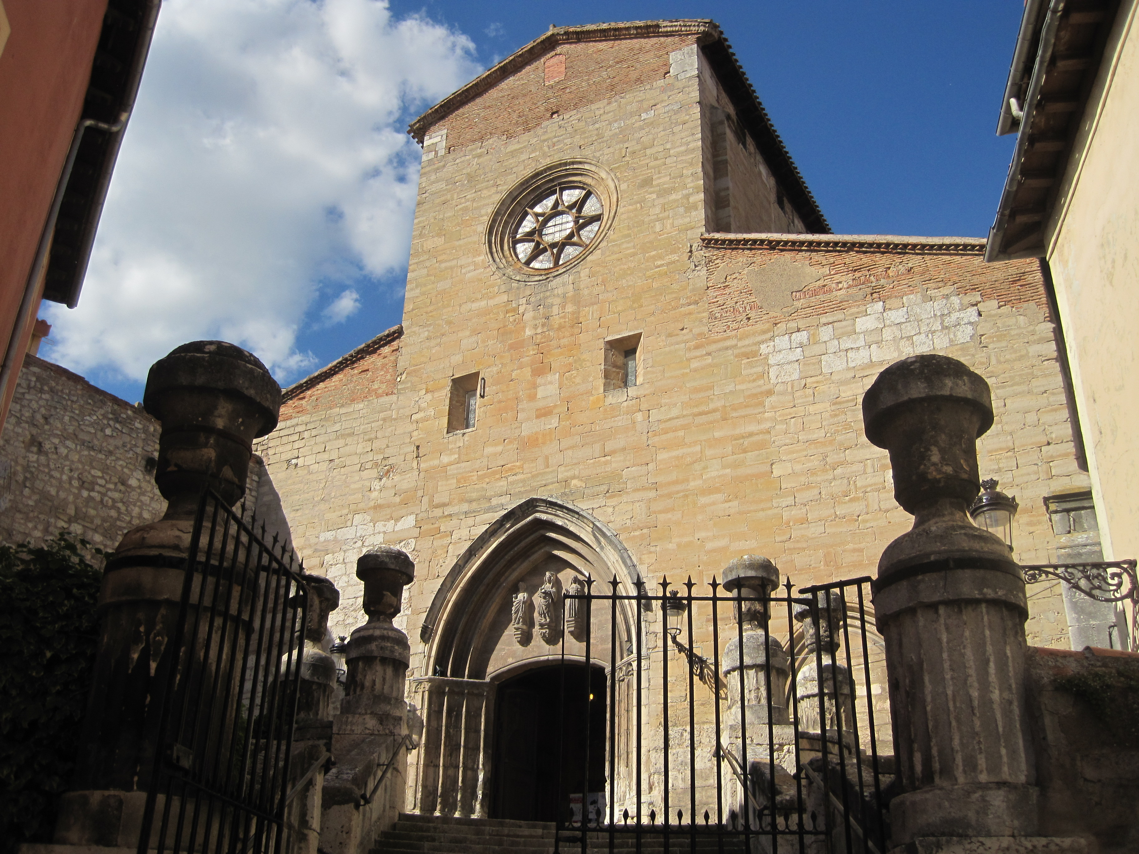 Vista de la fachada frontal de la iglesia de San Gil Abad de Burgos.